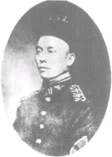 陈作新的照片，其人于1911年去世。